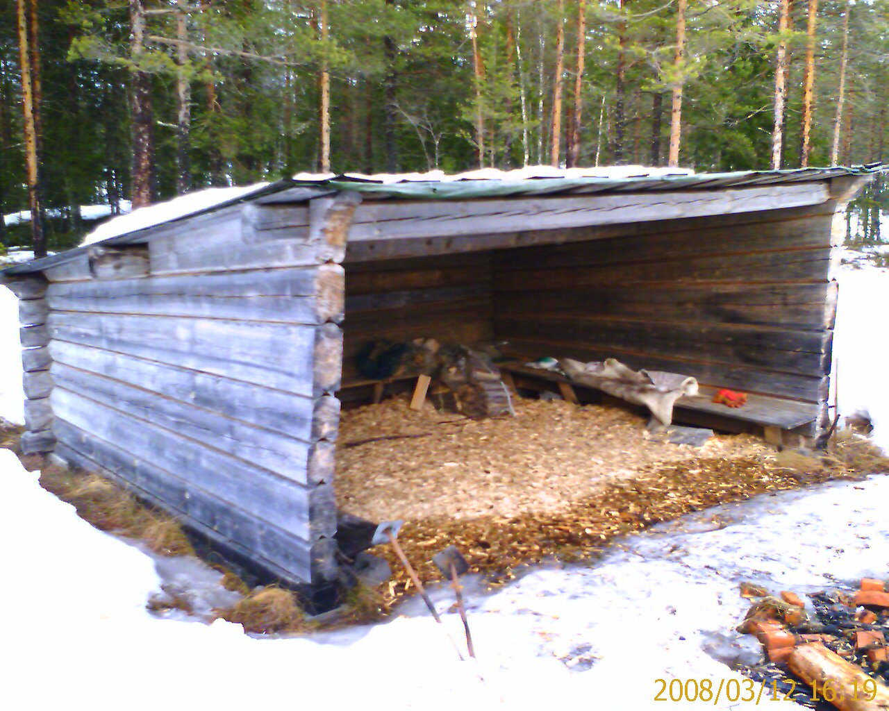 gapahuk i laftet tømmer